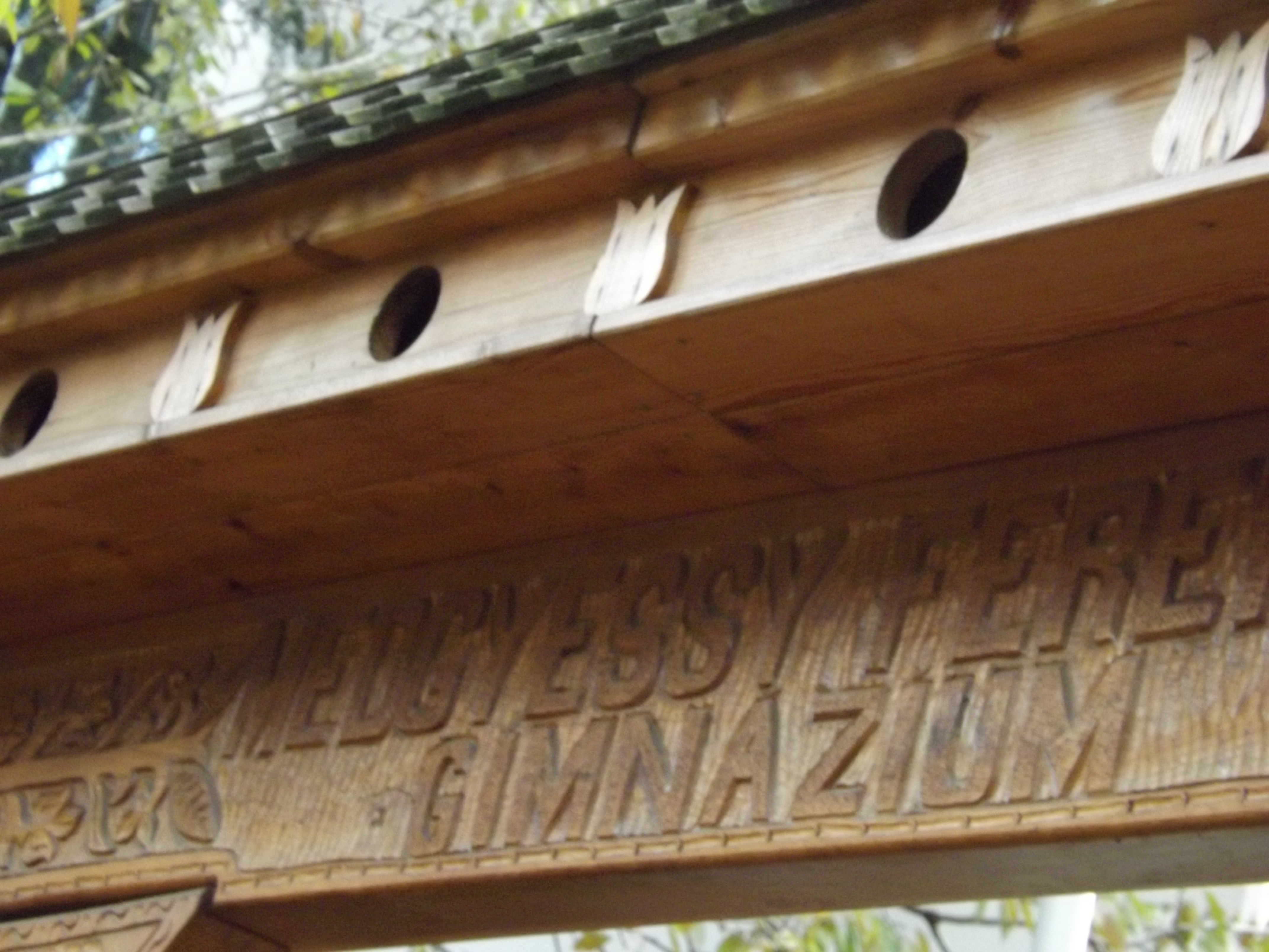 Debrecen, Tócóskert, a Medgyessy Ferenc Gimnázium kapujának részlete